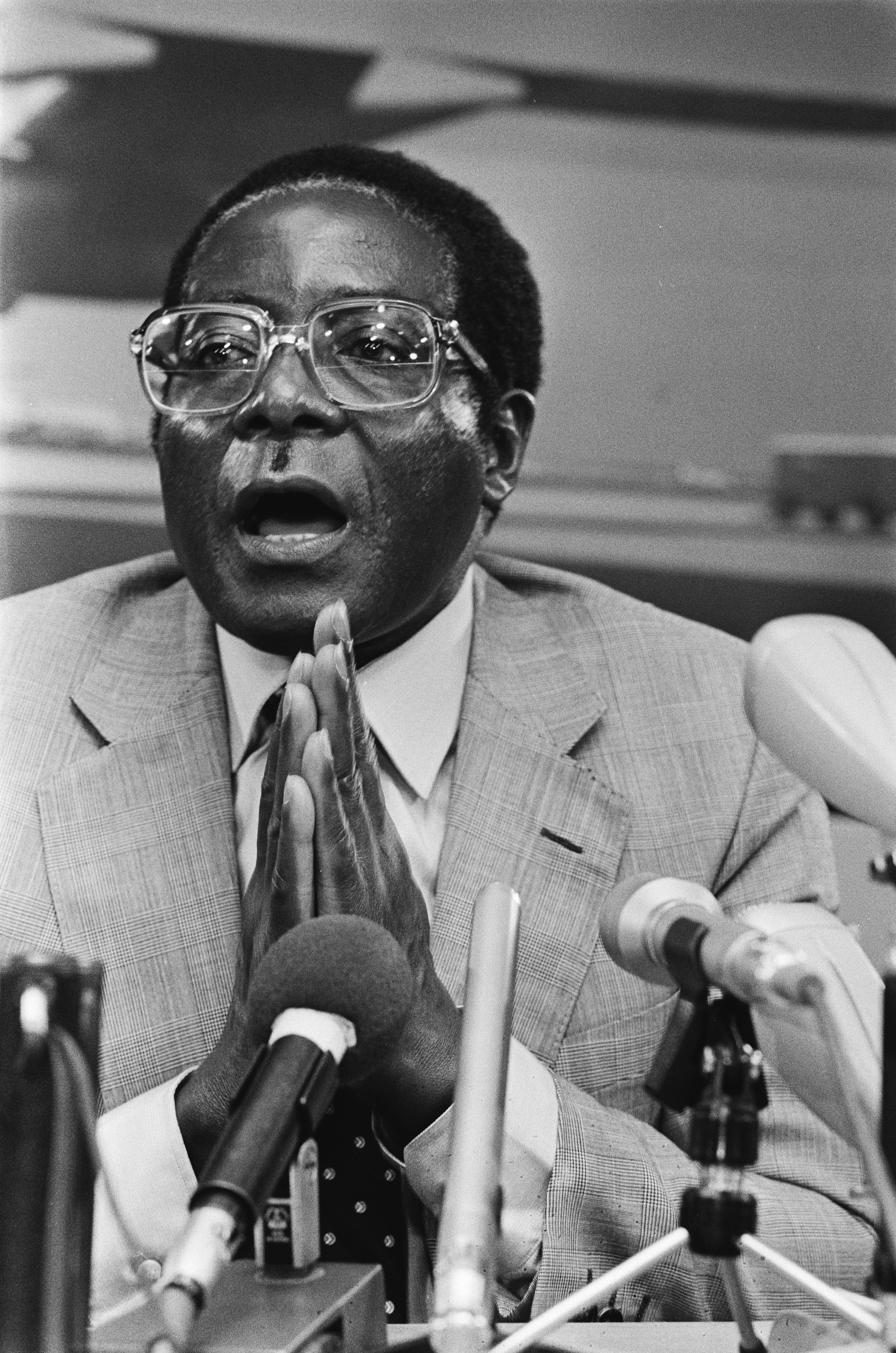 Collectie / Archief : Fotocollectie Anefo Reportage / Serie : [ onbekend ] Beschrijving : Persconferentie Robert Magabe , president Zimbabwe, op Schiphol na driedaags bezoek aan Nederland, kop Datum : 4 juni 1982 Locatie : Noord-Holland, Schiphol Trefwoorden : bezoeken, persconferenties, presidenten Fotograaf : Antonisse, Marcel / Anefo Auteursrechthebbende : Nationaal Archief Materiaalsoort : Negatief (zwart/wit) Nummer archiefinventaris : bekijk toegang 2.24.01.05 Bestanddeelnummer : 932-1957